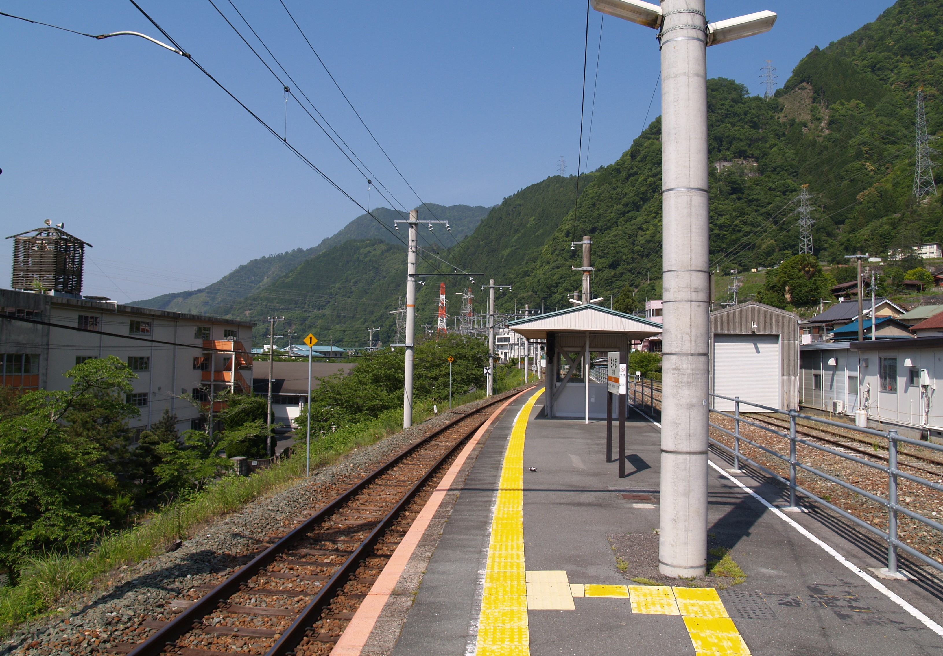 佐久間駅ホーム